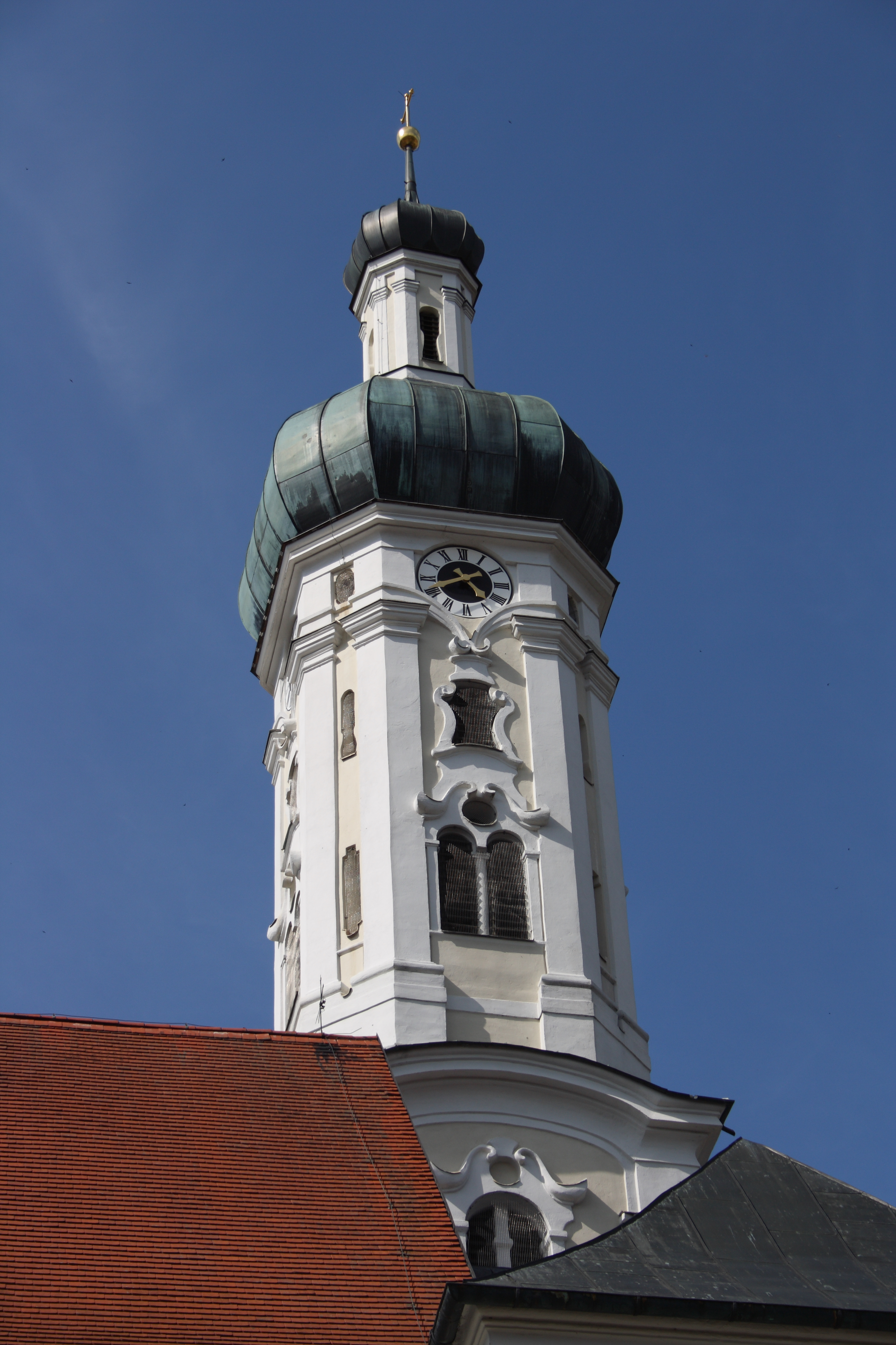 Katholische Pfarrkirche St. Martin in Pfaffenhofen an der Zusam im Landkreis Dillingen an der Donau (Bayern), Zwiebelturm